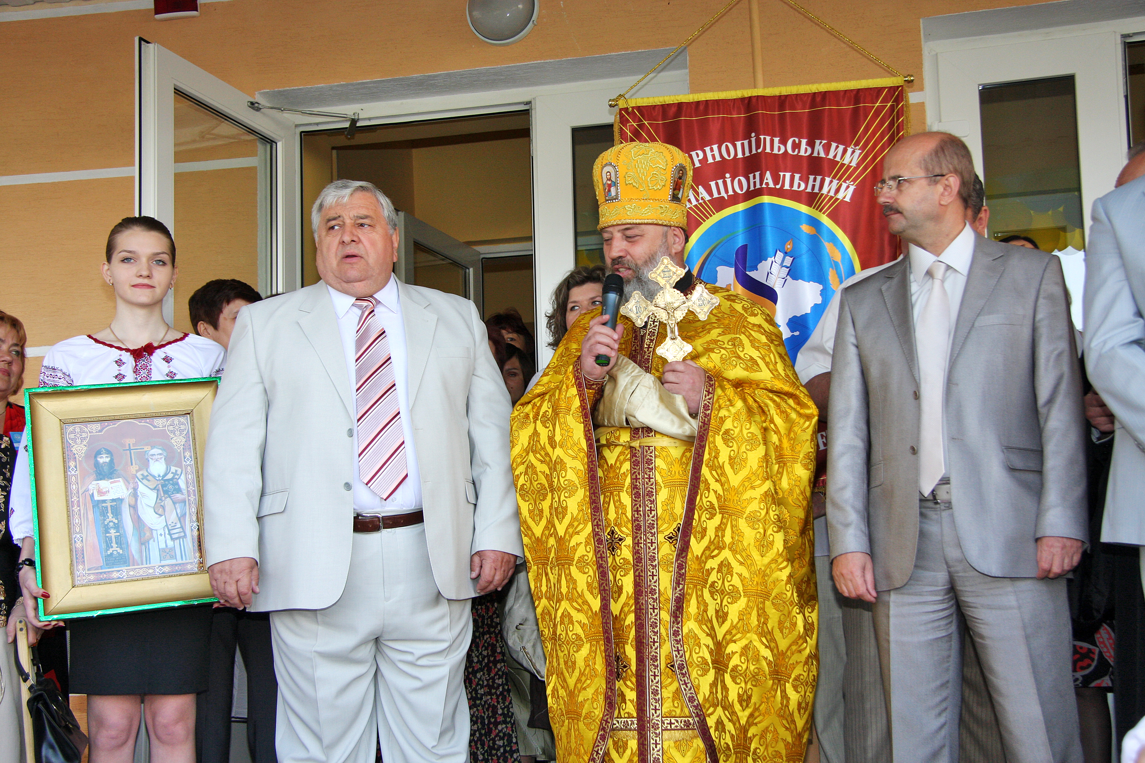 Ікона, як оберіг бібліотеки